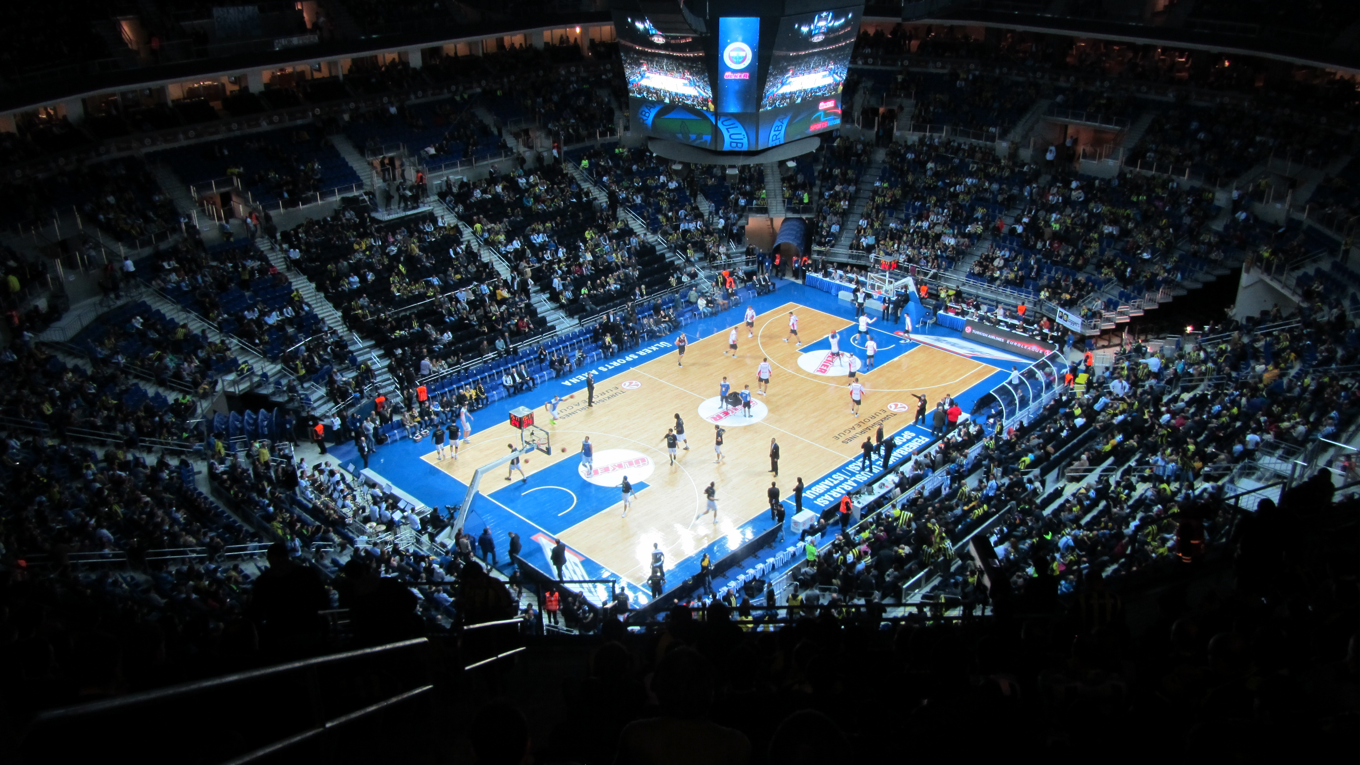 Ülker Sports Arena: Fenerbahçe vs. Armani Milano